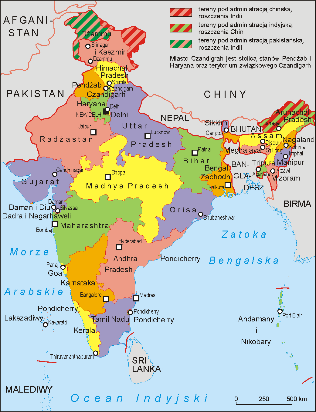 Podział administracyjny Indii w 1999 roku. Autor Aotearoa